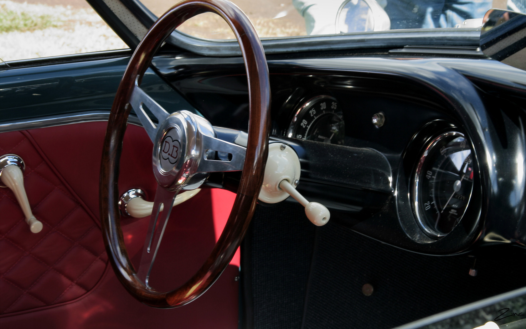 1959 Deutsch Bonnet HBR5 - int